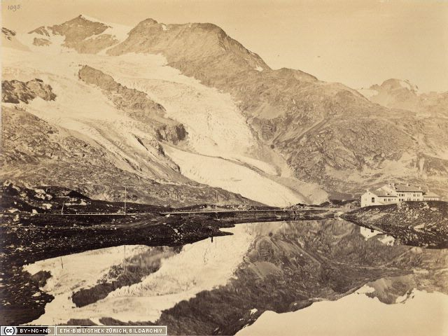 Ansicht des Berninapasses mit Cambrenagletscher 1867